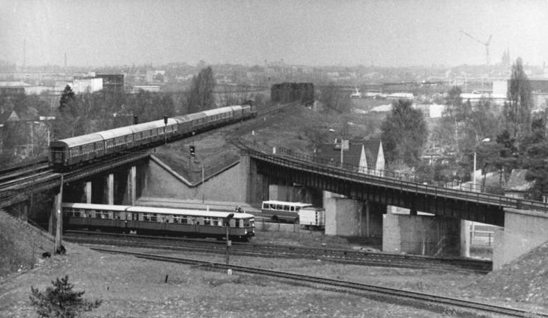 ADN-ZB-Schindler-5.6.80 Berlin: Tag des Eisenbahners Blick vom Stellwerk Grünauer Kreuz zum Adlergestell. Von dieser Leitstelle aus werden ca. 480 Zugfahrten zwischen der Hauptstadt und dem Süden der DDR innerhalb von 24 Stunden gesteuert.